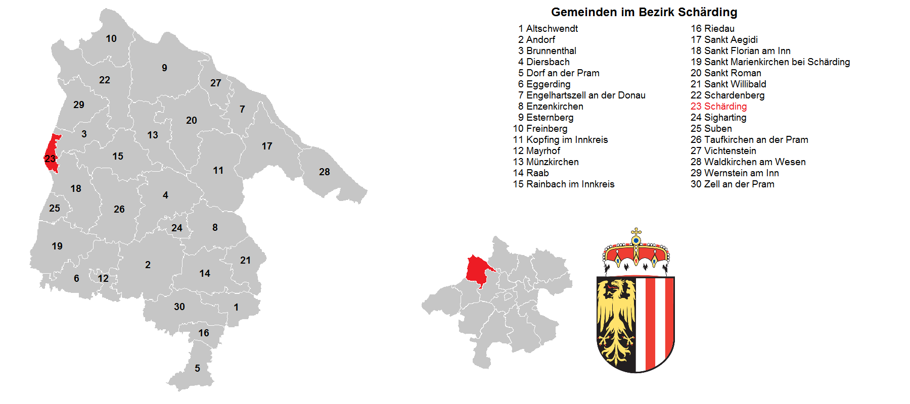 Bezirk Schärding